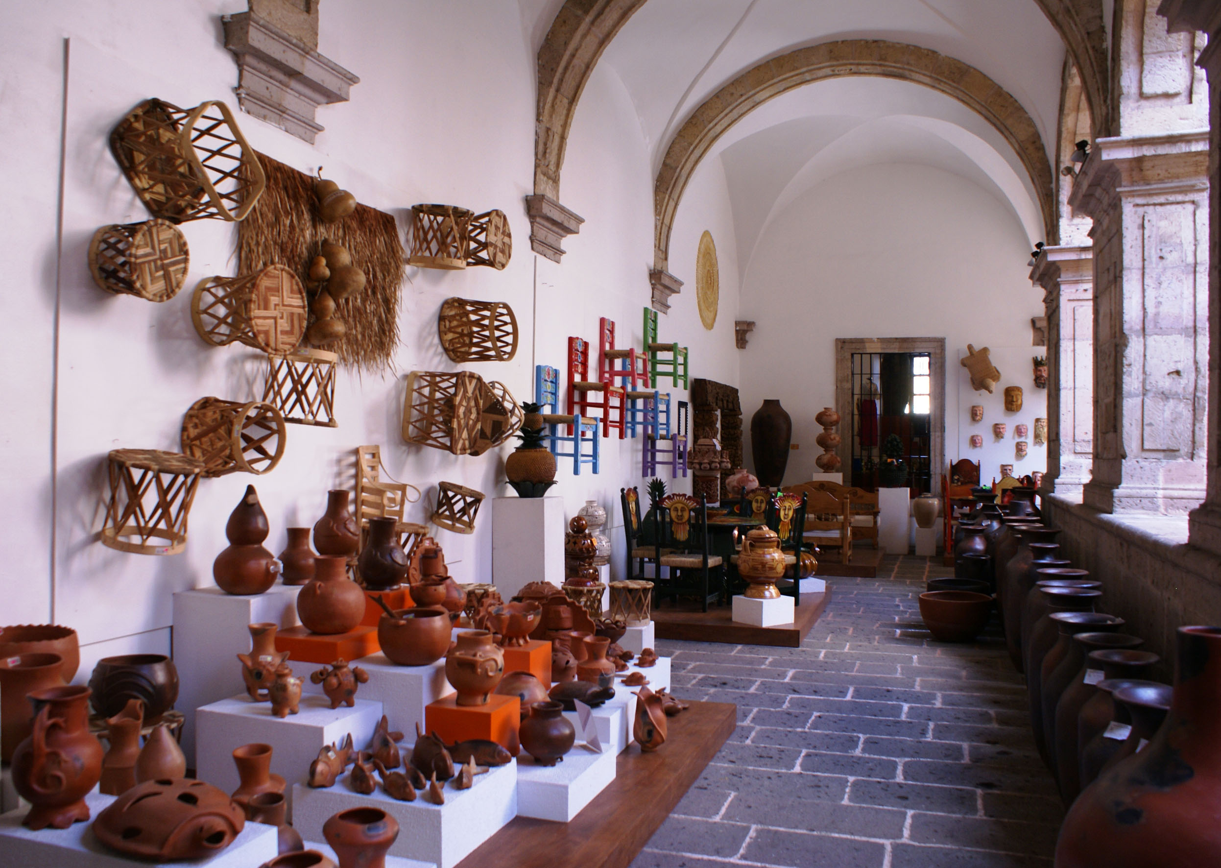 Casa de las Artesanías de Michoacán, recinto cultural público ubicado en la ciudad de Morelia, Michoacán, México; enfocado en la conservación y difusión del arte popular de las distintas regiones del estado, tiene su sede en un ex convento del siglo XVI.